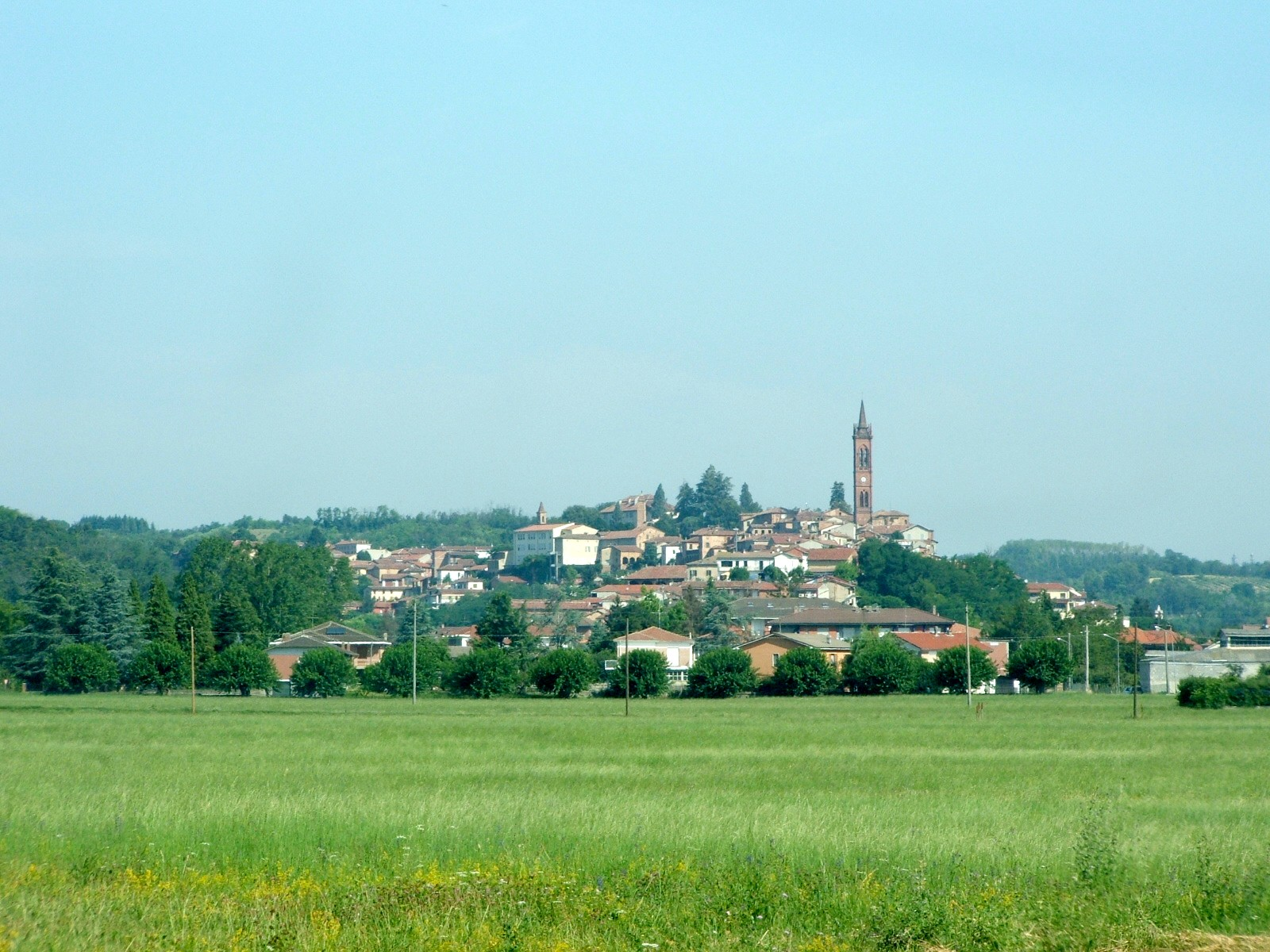 Panorama di Fubine, provincia di Alessandria, Piemonte, Italia.